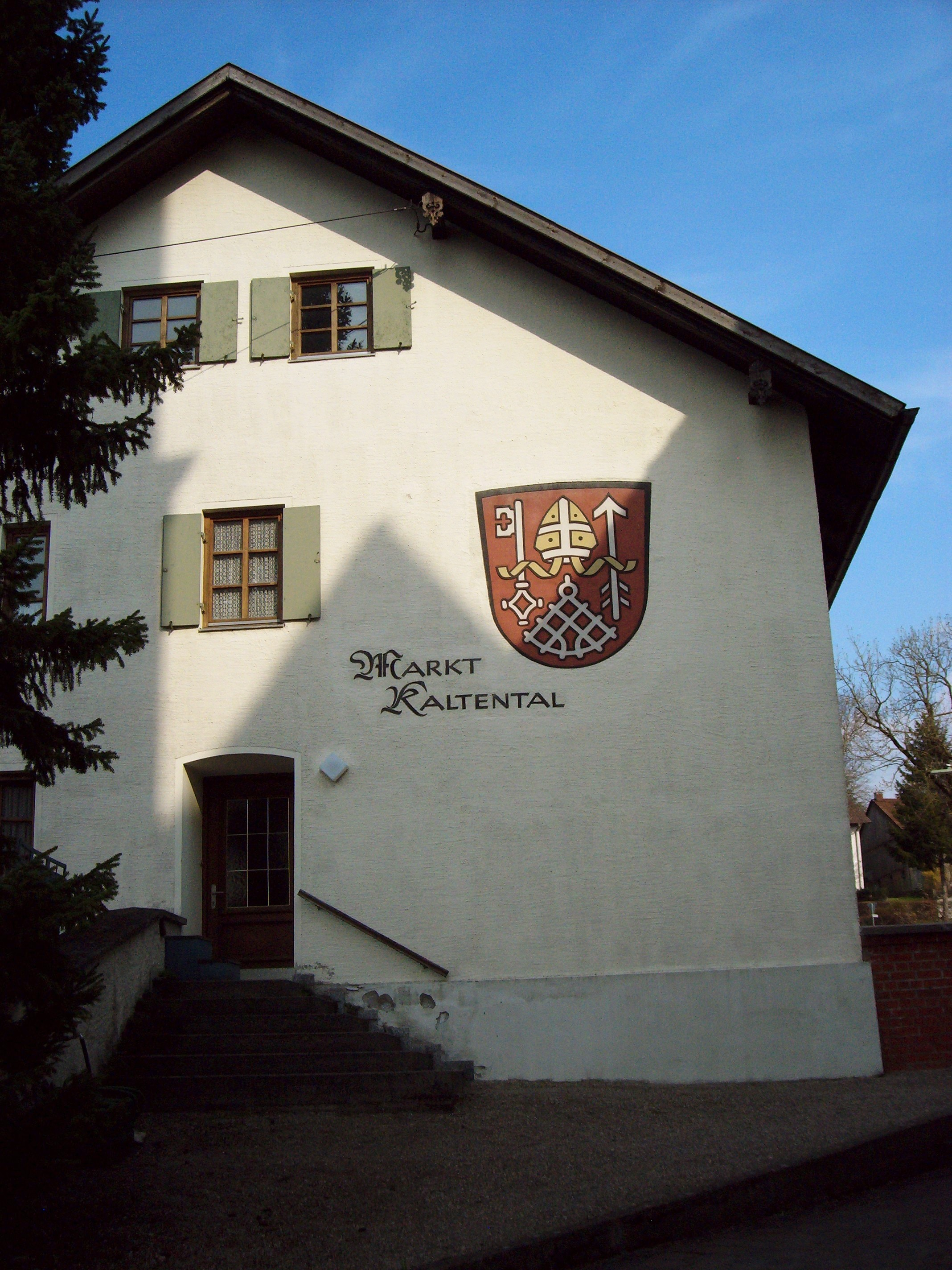 Gemeindeverwaltung der Gemeinde Kaltental in Aufkirch im Landkreis Ostallgäu